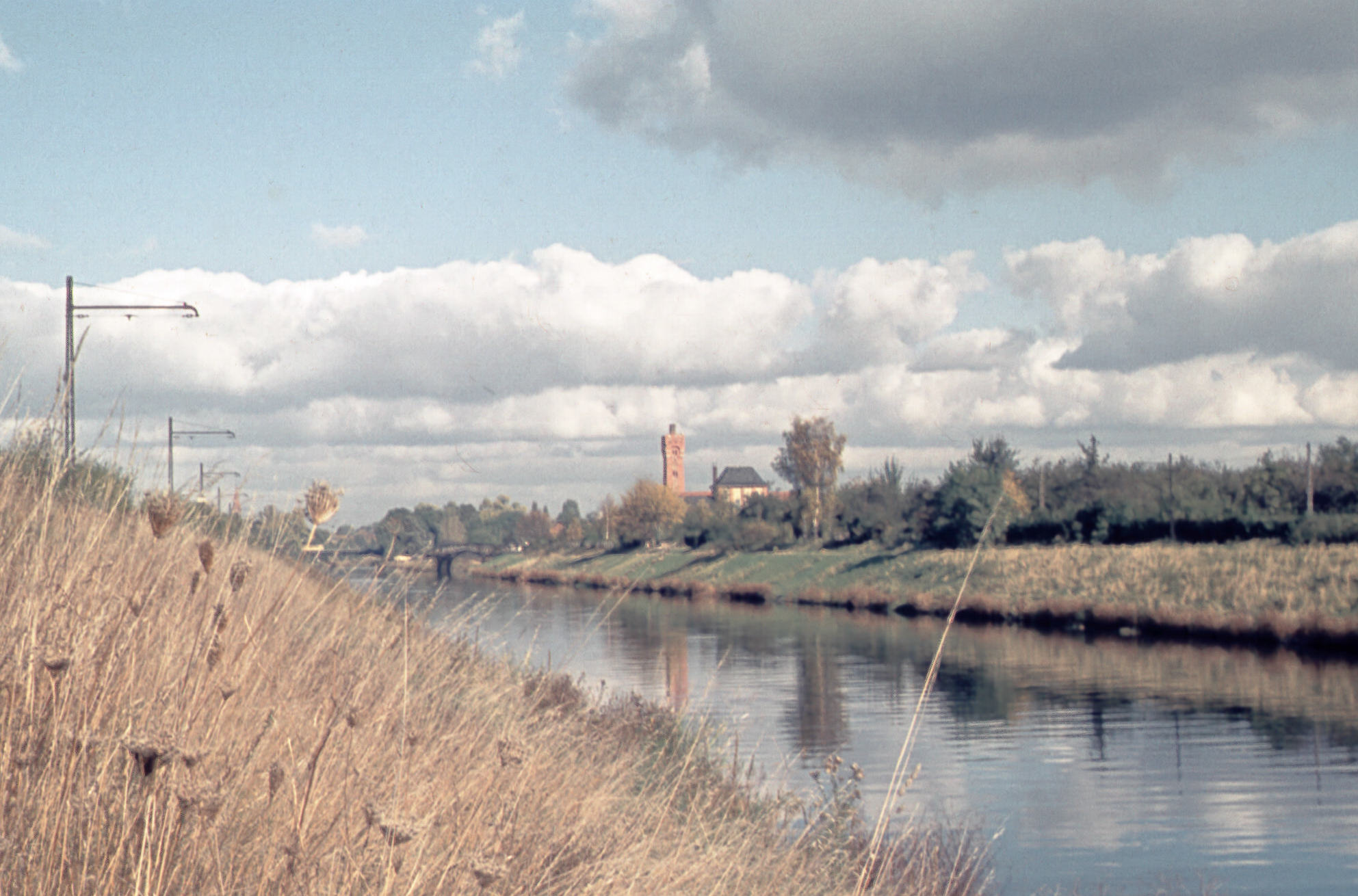 Teltowkanal, Nähe Hafen Lichterfelde, ca. 1955, mit Resten der Treidelbahn